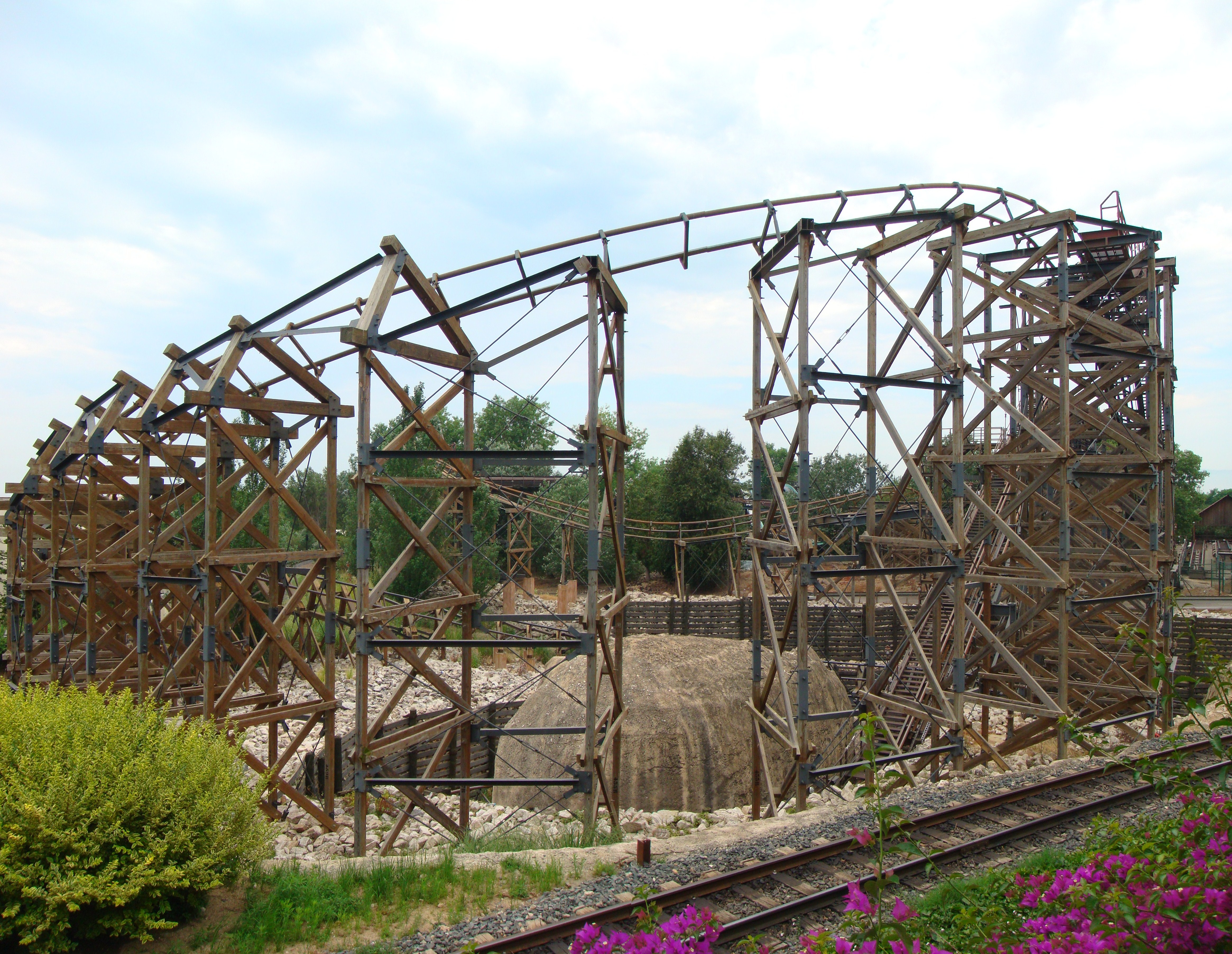 El tren de la mina - El Diablo